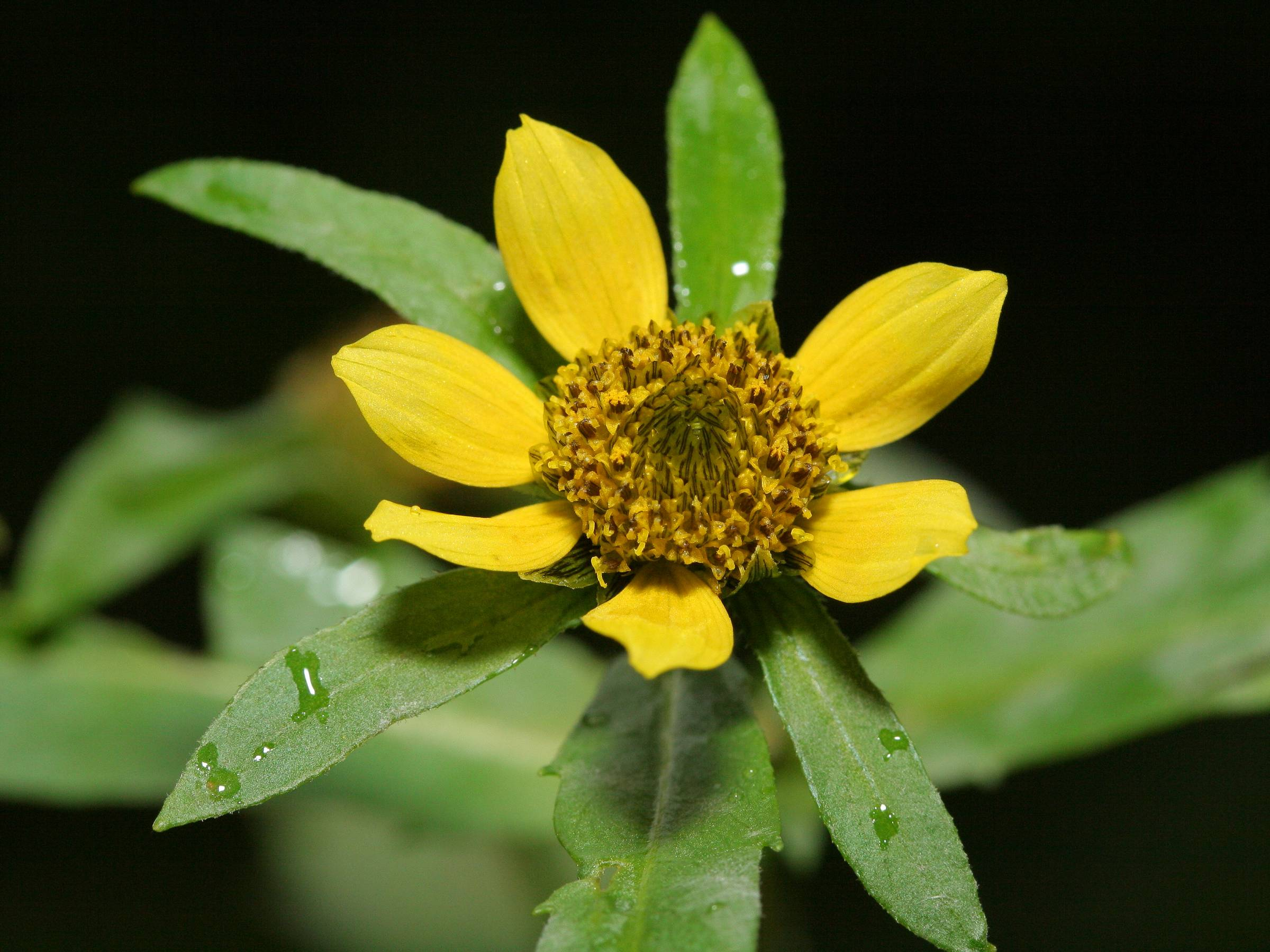 Nickender Zweizahn (Bidens cernua), Arbeitstreffen 31.08.2007